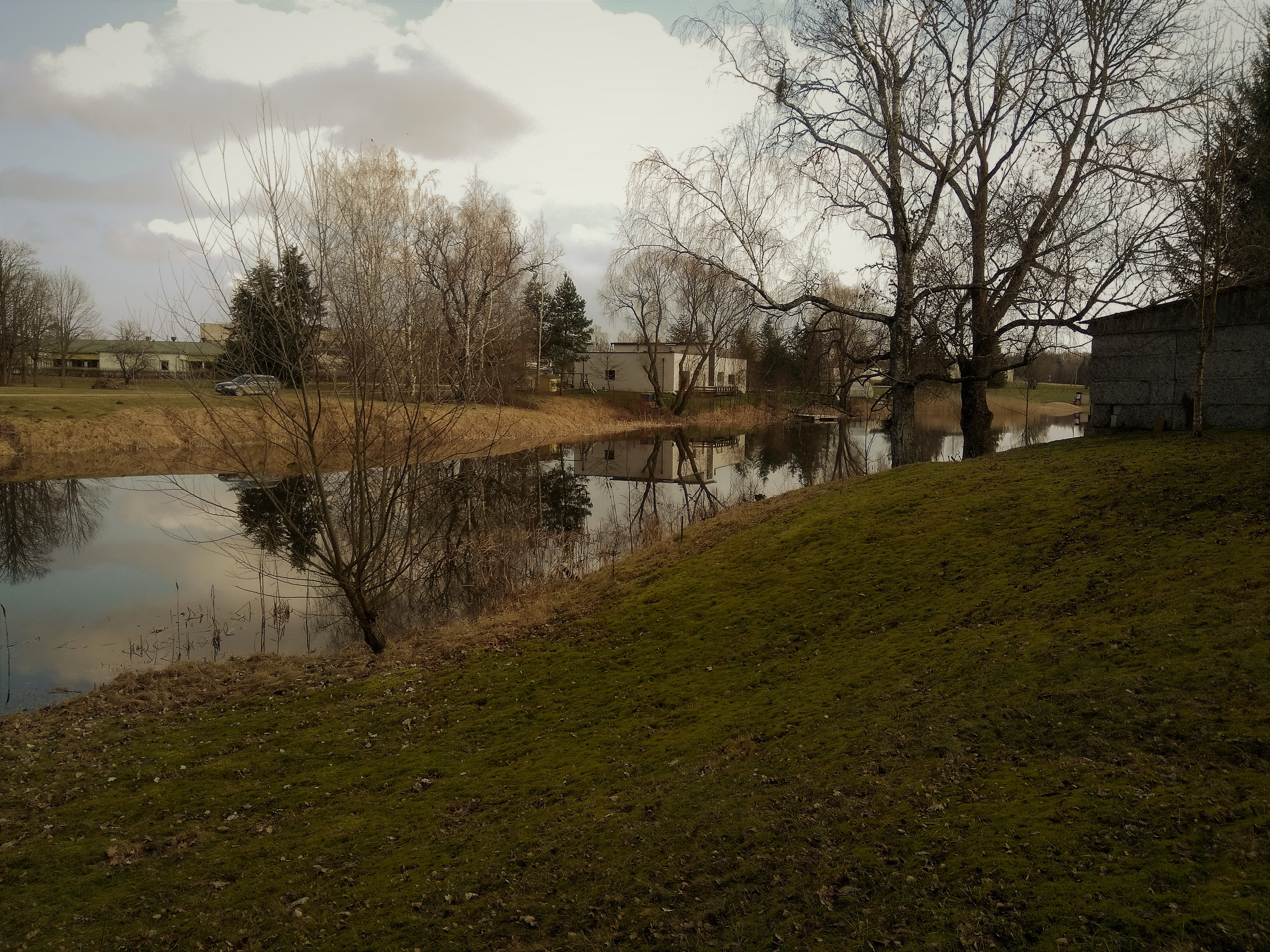 Vaade linnuseala kirdenurgast üle veskipaisjärve kagusse.